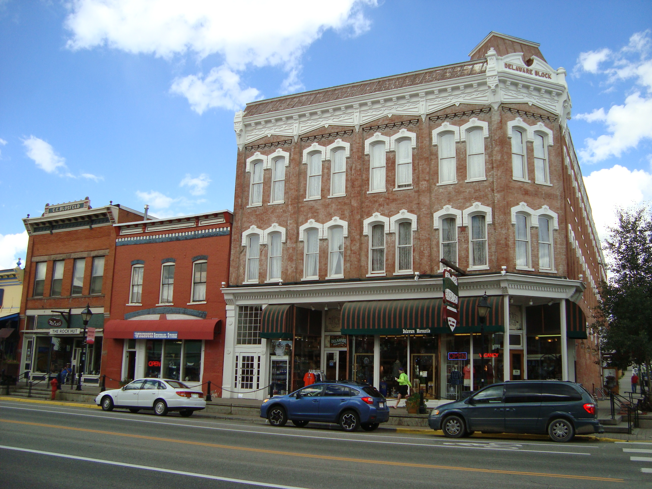 Leadville, Harrison Ave (corner with East 7th St.)